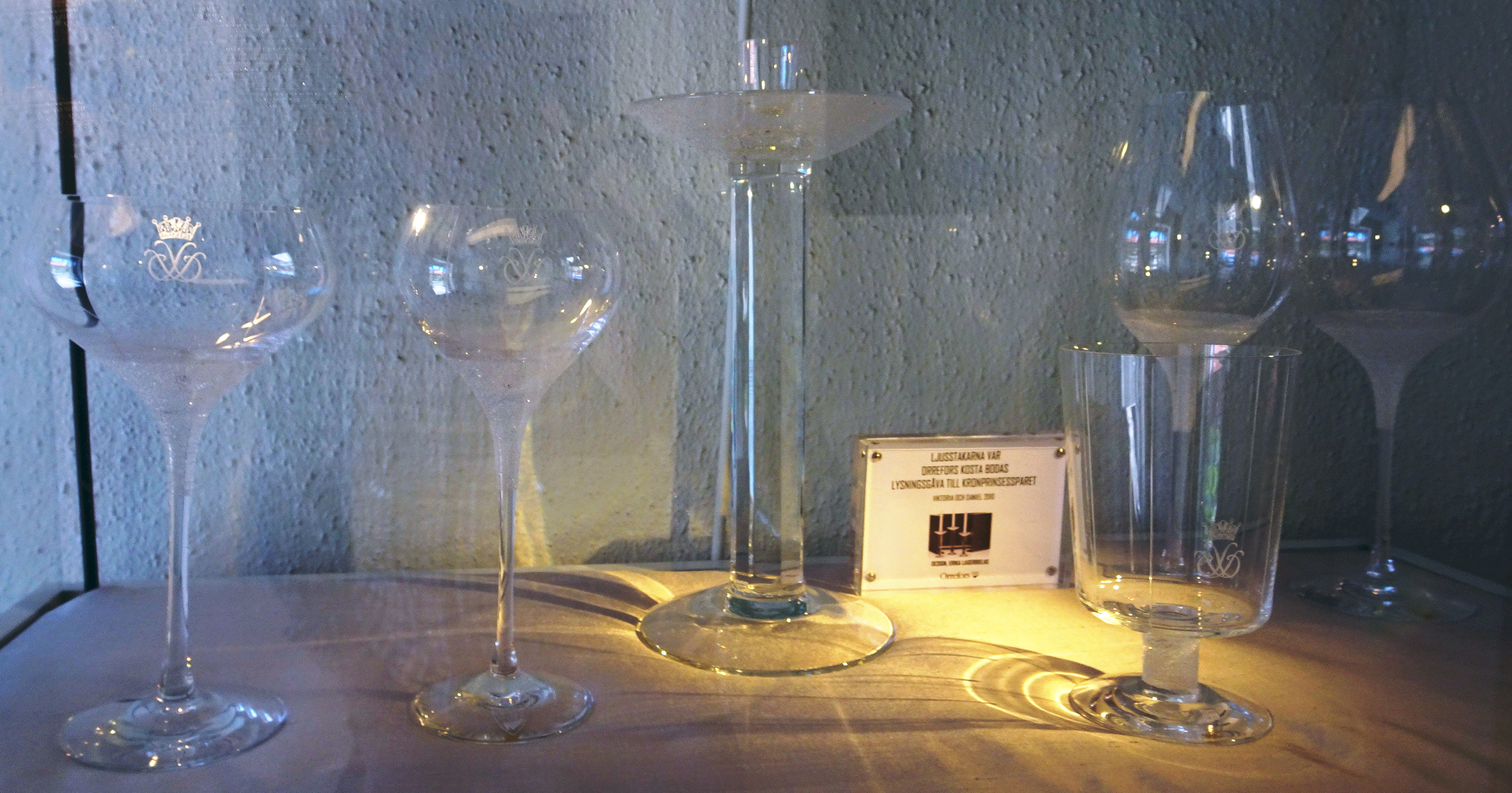 Bröllopsservicen för Kronprinsessan Viktoria och Daniel Westling av Erika Lagerbielke, Orrefors